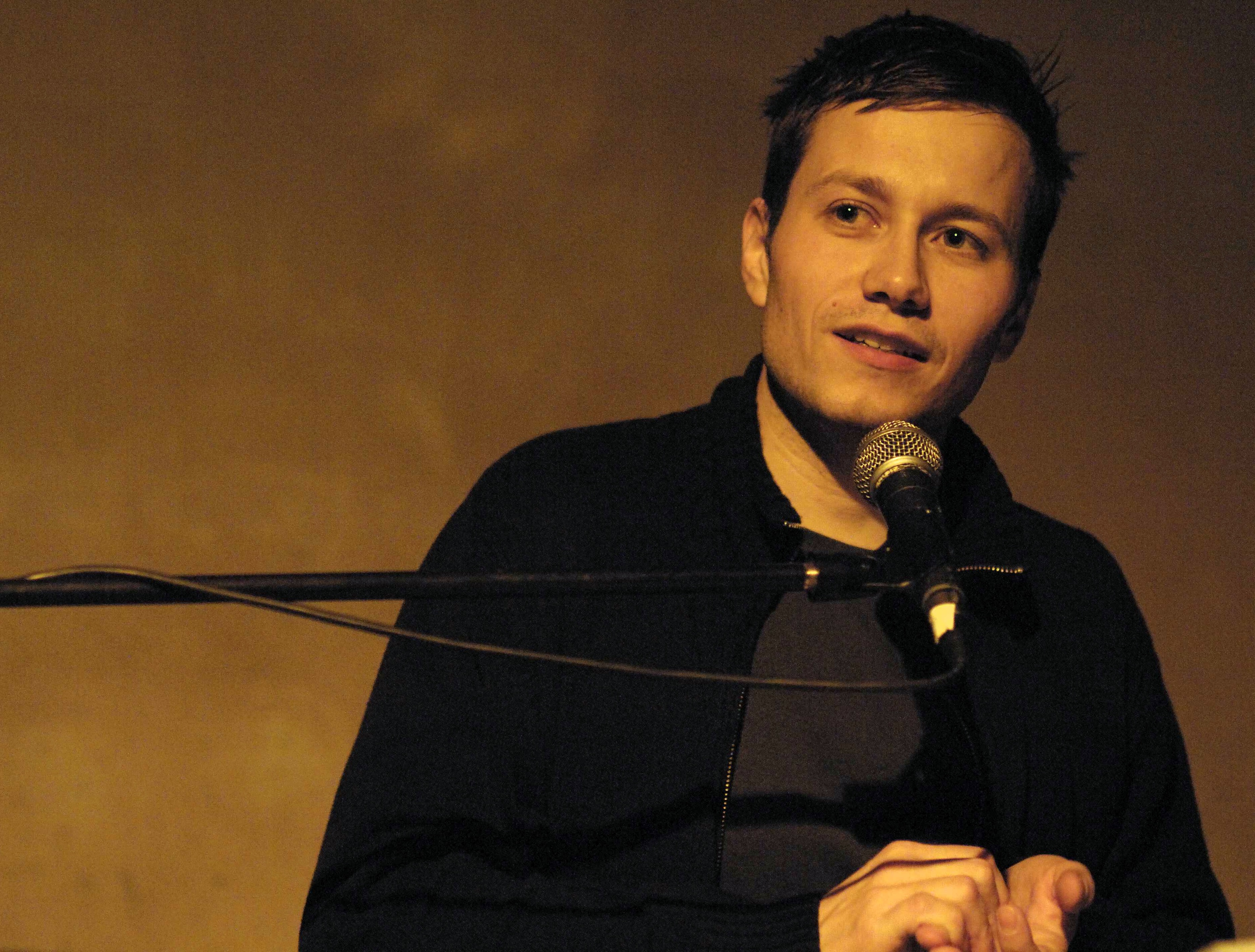 Marco Tschirpke 2007 bei einem Liveauftritt in Berlin